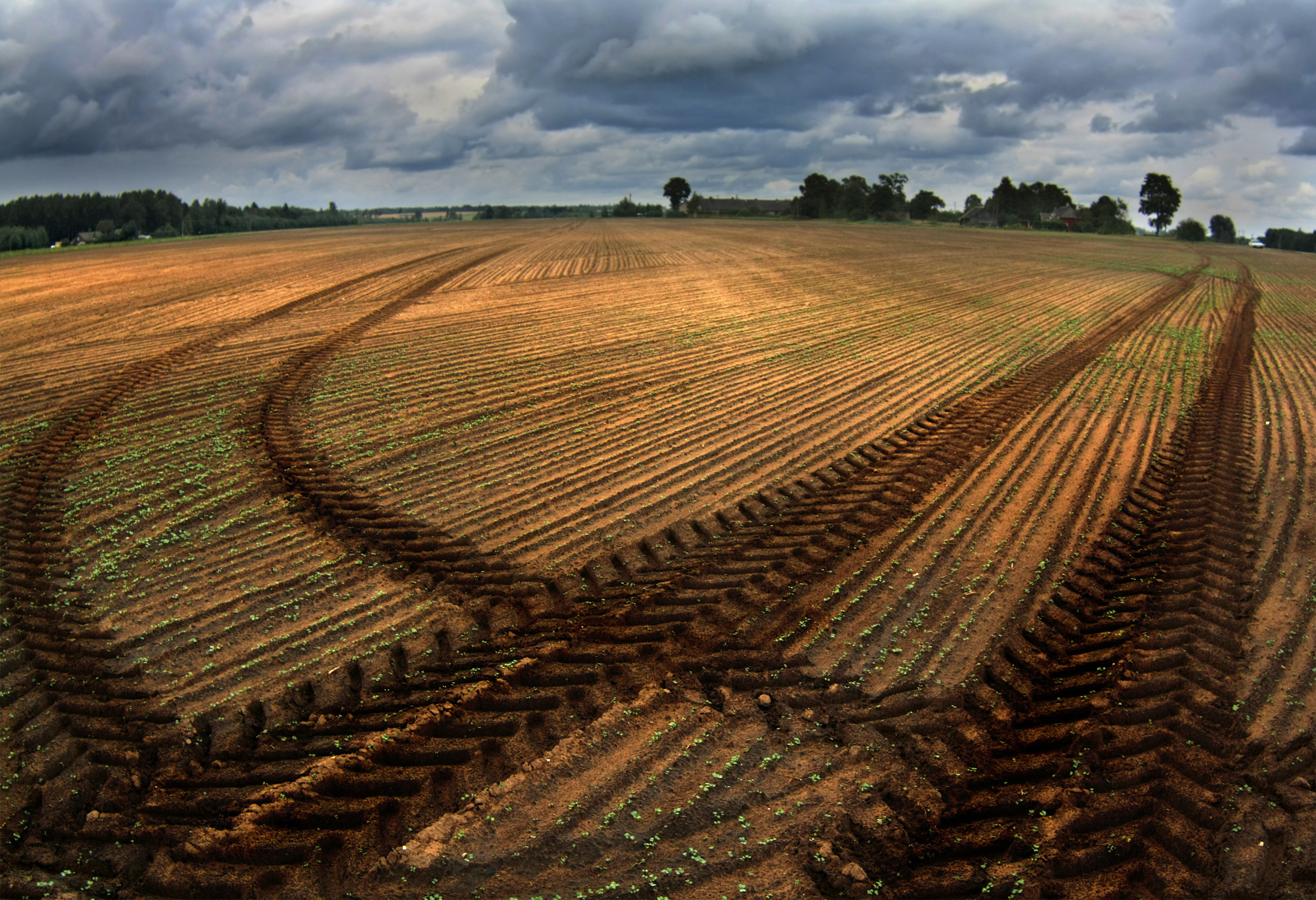 Rapsi oras Lääne-Virumaal.Laekvere vald